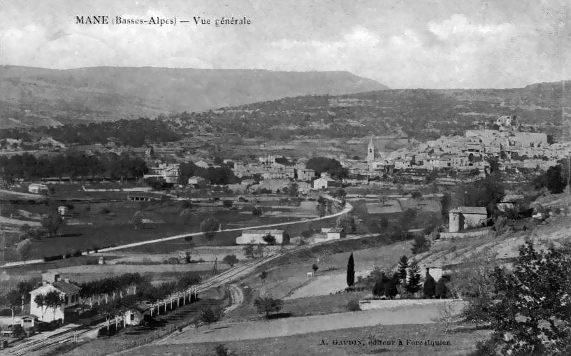 Vue générale de Mane dans les Alpes de Haute-Provence anciennement Basses-Alpes. Au premier plan en bas à gauche, la gare de Mane PLM située sur la ligne de Forcalquier à Volx